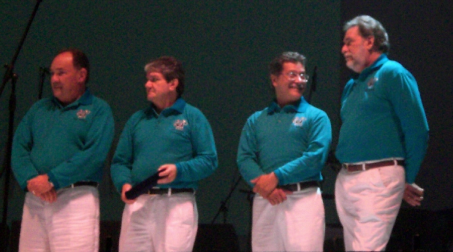 Venezuelan group Serenata Guayanesa